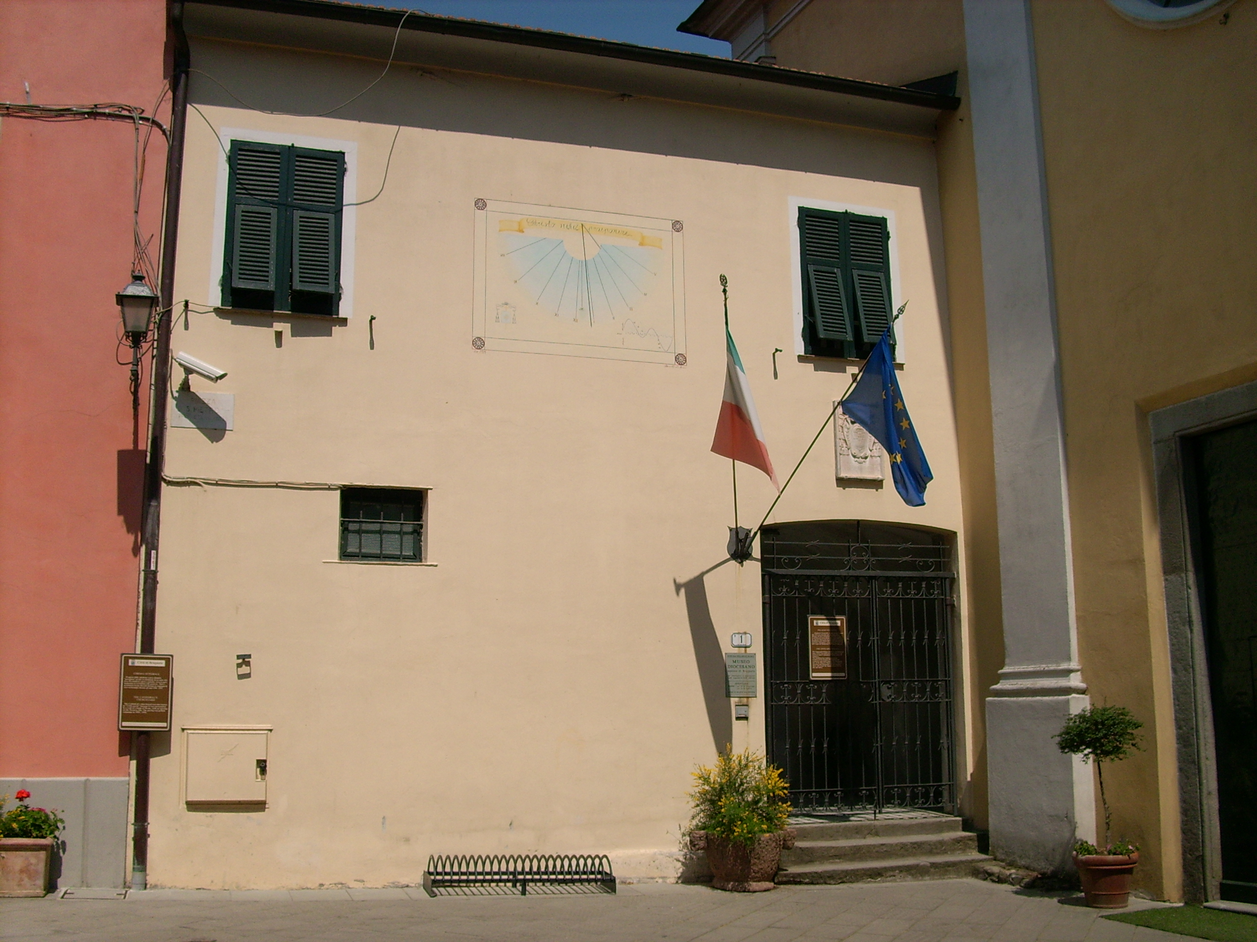 Museo Diocesano di Brugnato, Liguria, Italia